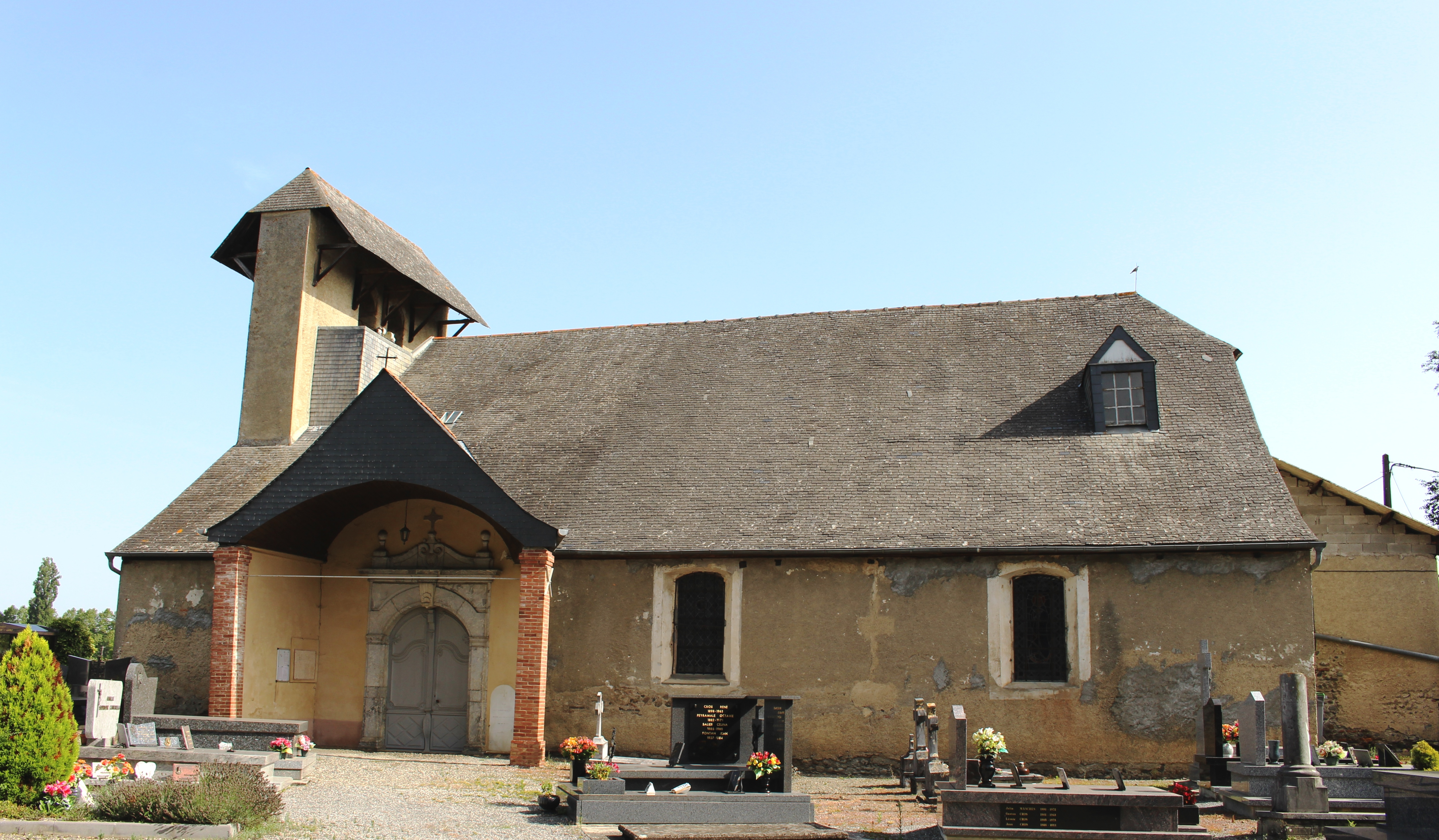 Église Saint-Jean-Baptiste de Gayan (Hautes-Pyrénées)